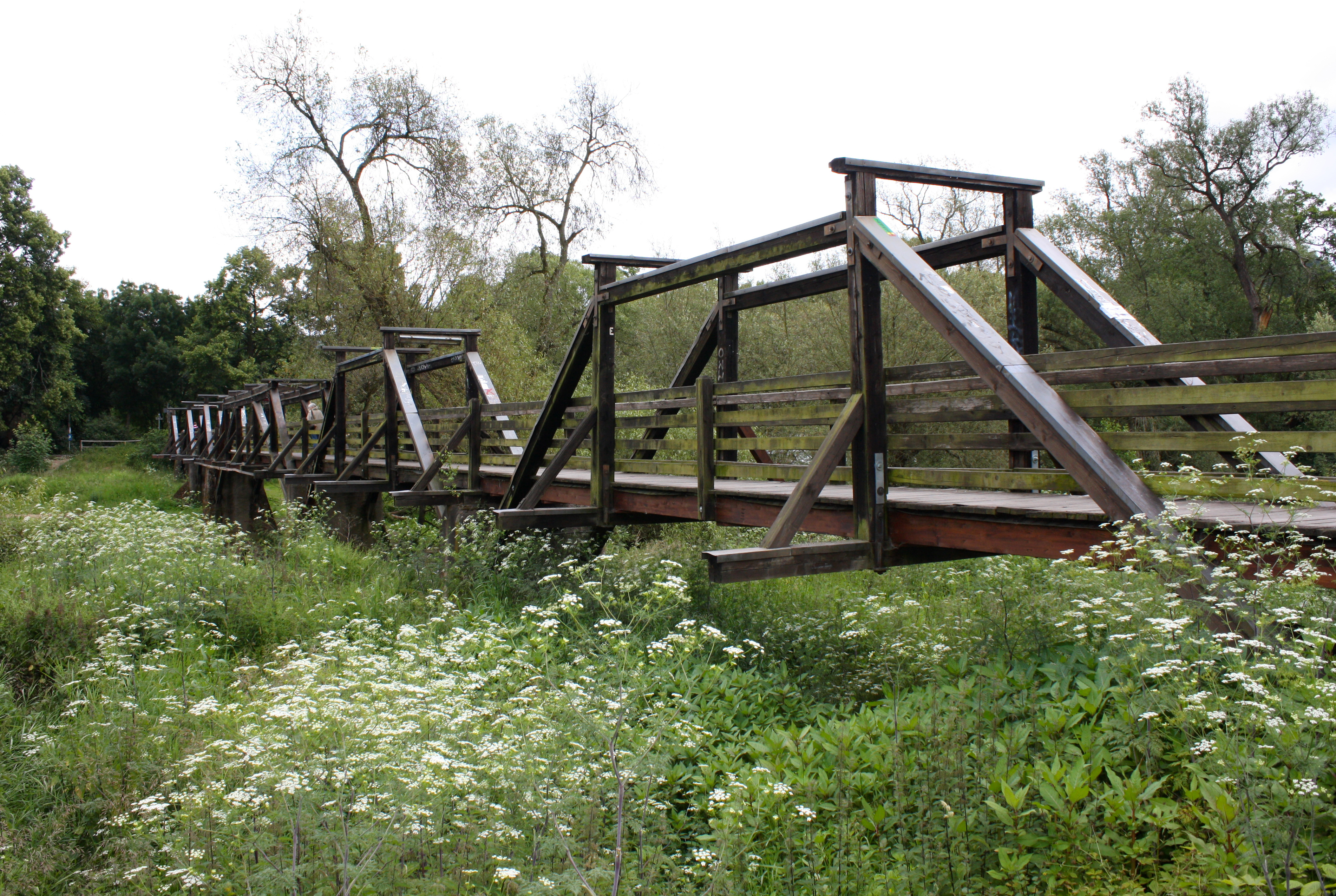 Der "Hirsefeldsteg" über die Lahn in Marburg. Wurde im Herbst 2009 abgerissen und 2010 durch eine neue Brücke gleichen Namens ersetzt.